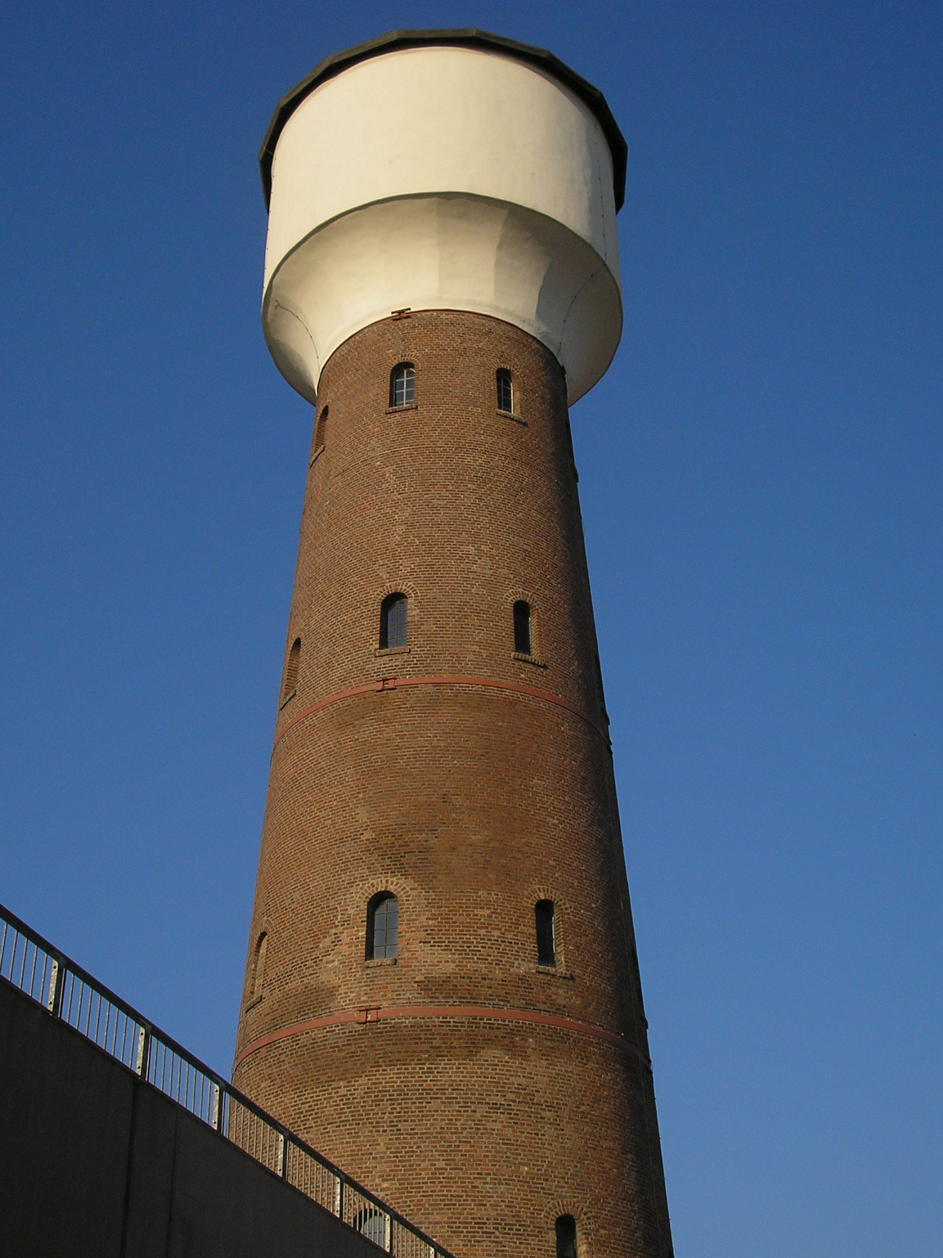 CFK-Wasserturm in den Köln Arcaden in Köln-Kalk